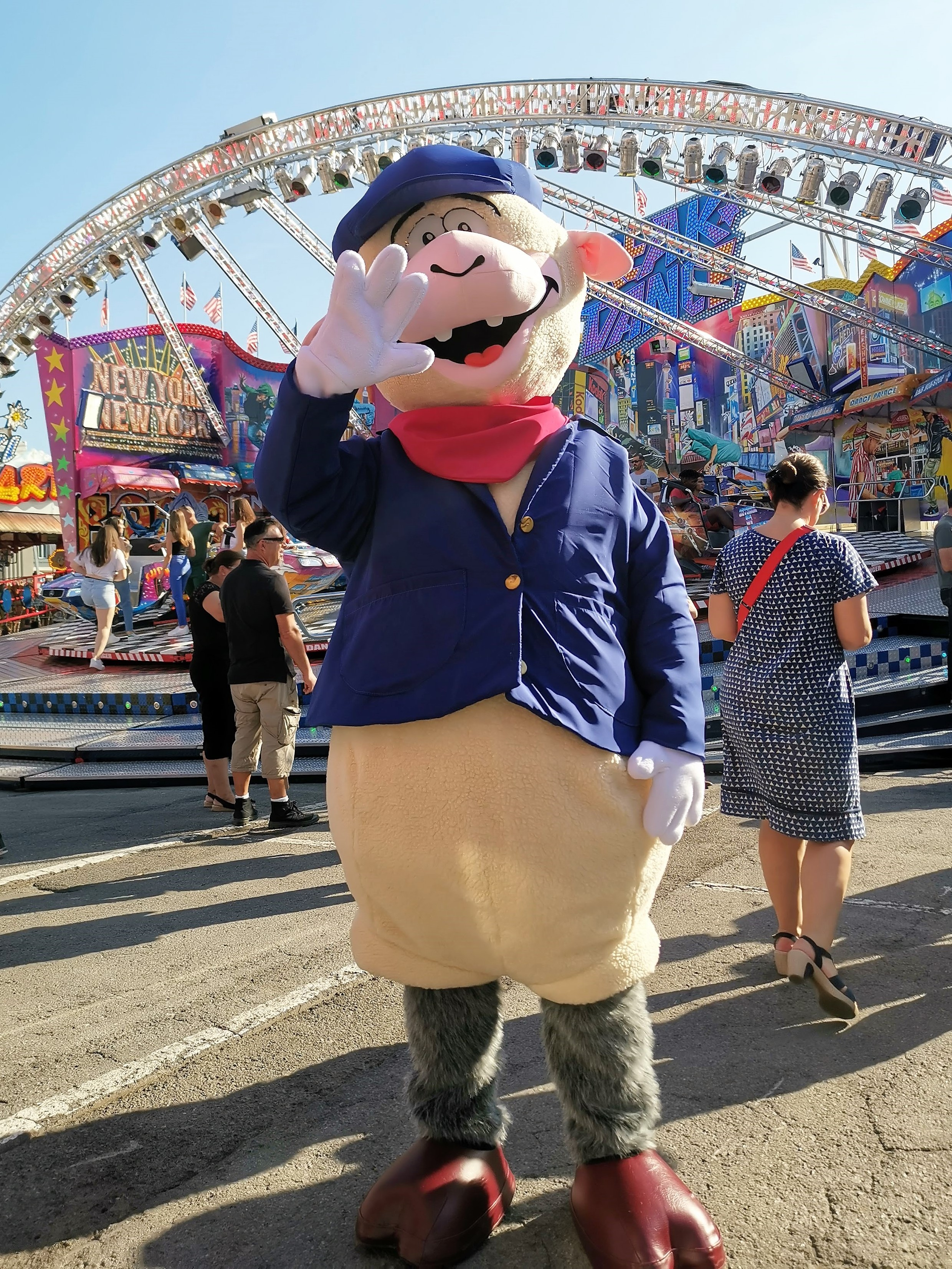 Luxembourg, ouverture de la Schueberfour 2019.